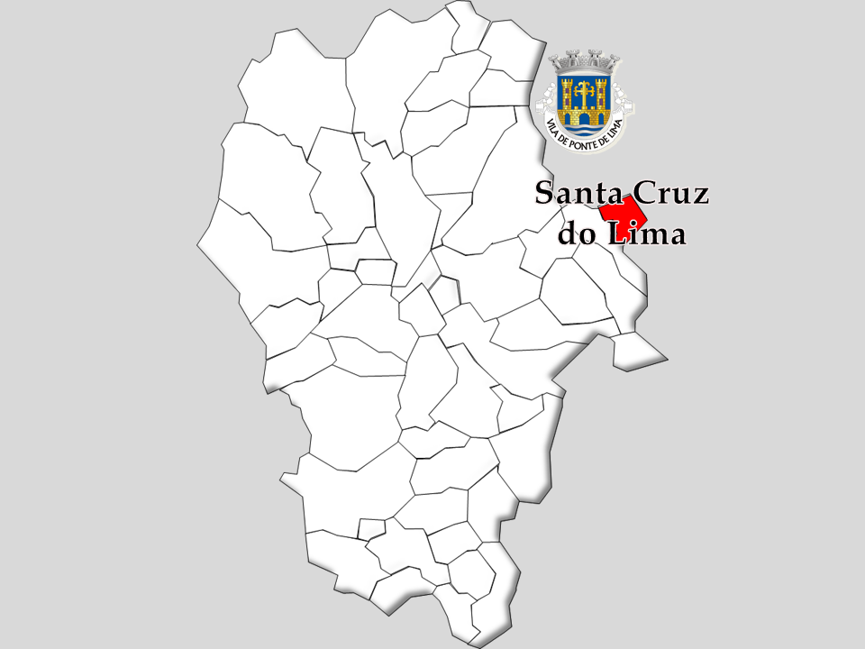 Censos 1864/2011